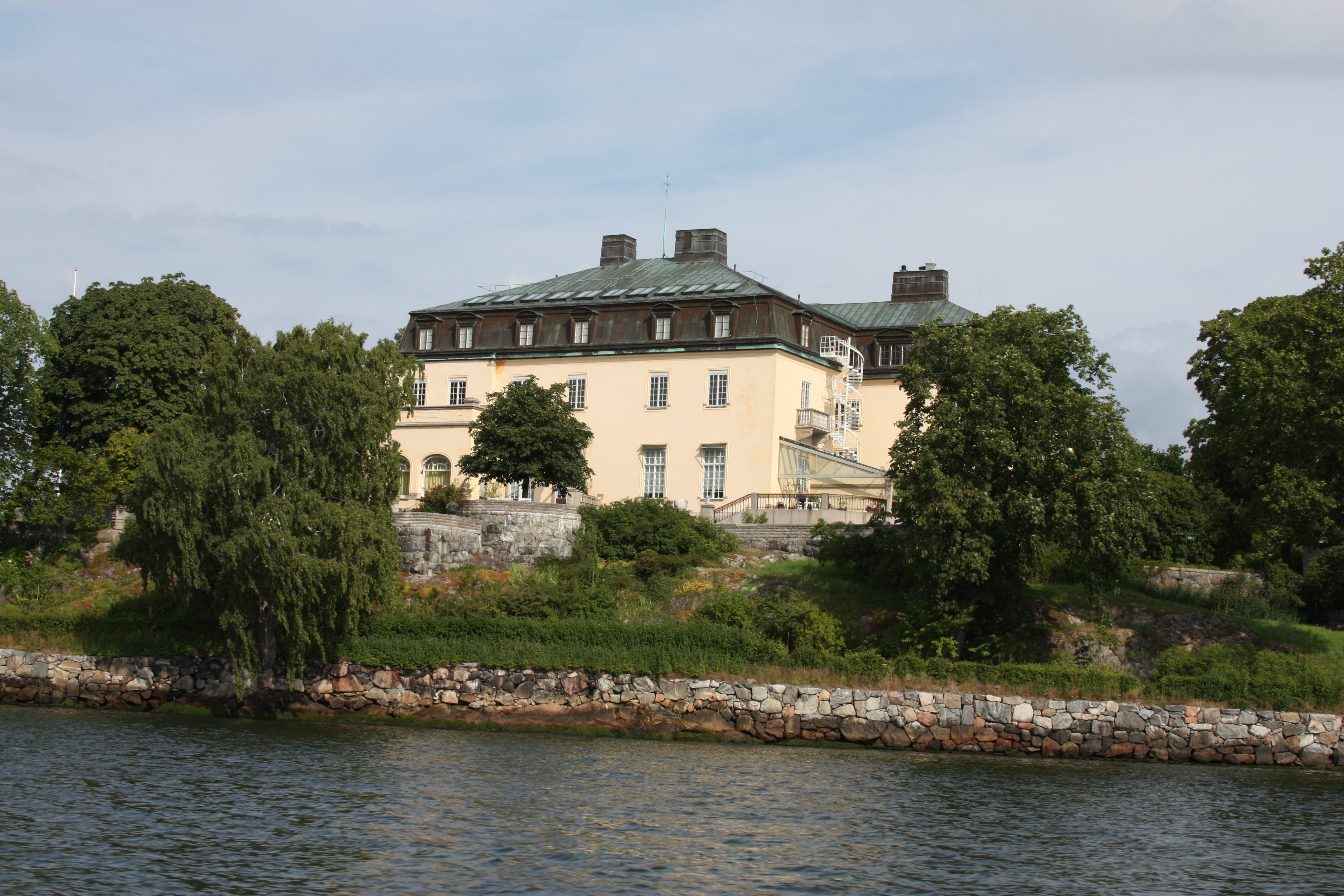 Stockholm